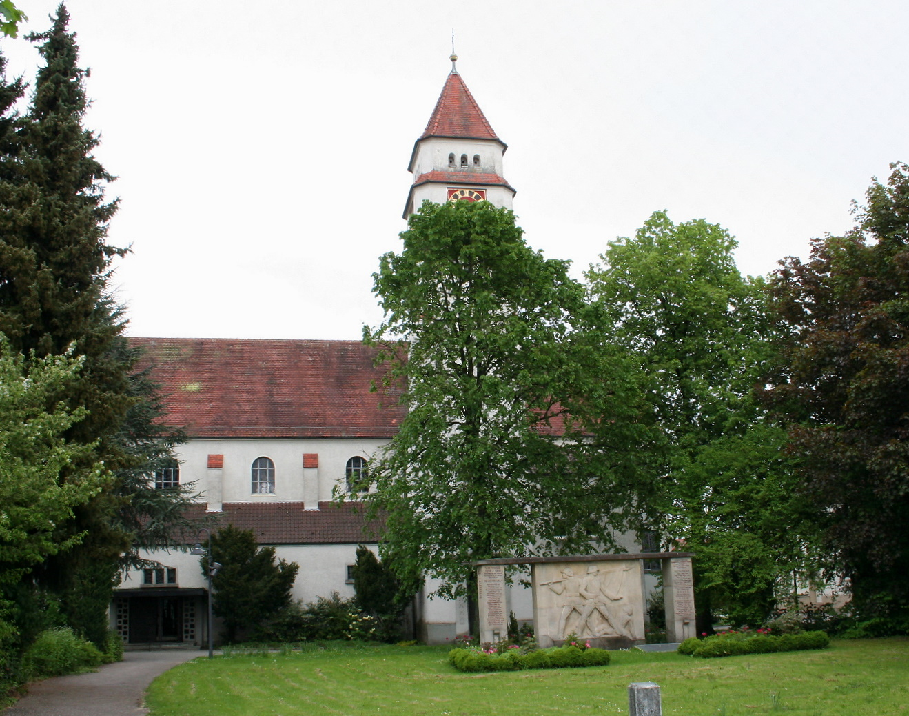 Katholische Kirche "St. Maria von der immerwährenden Hilfe" in Meckenbeuren; eingeweiht am 30. Oktober 1913.